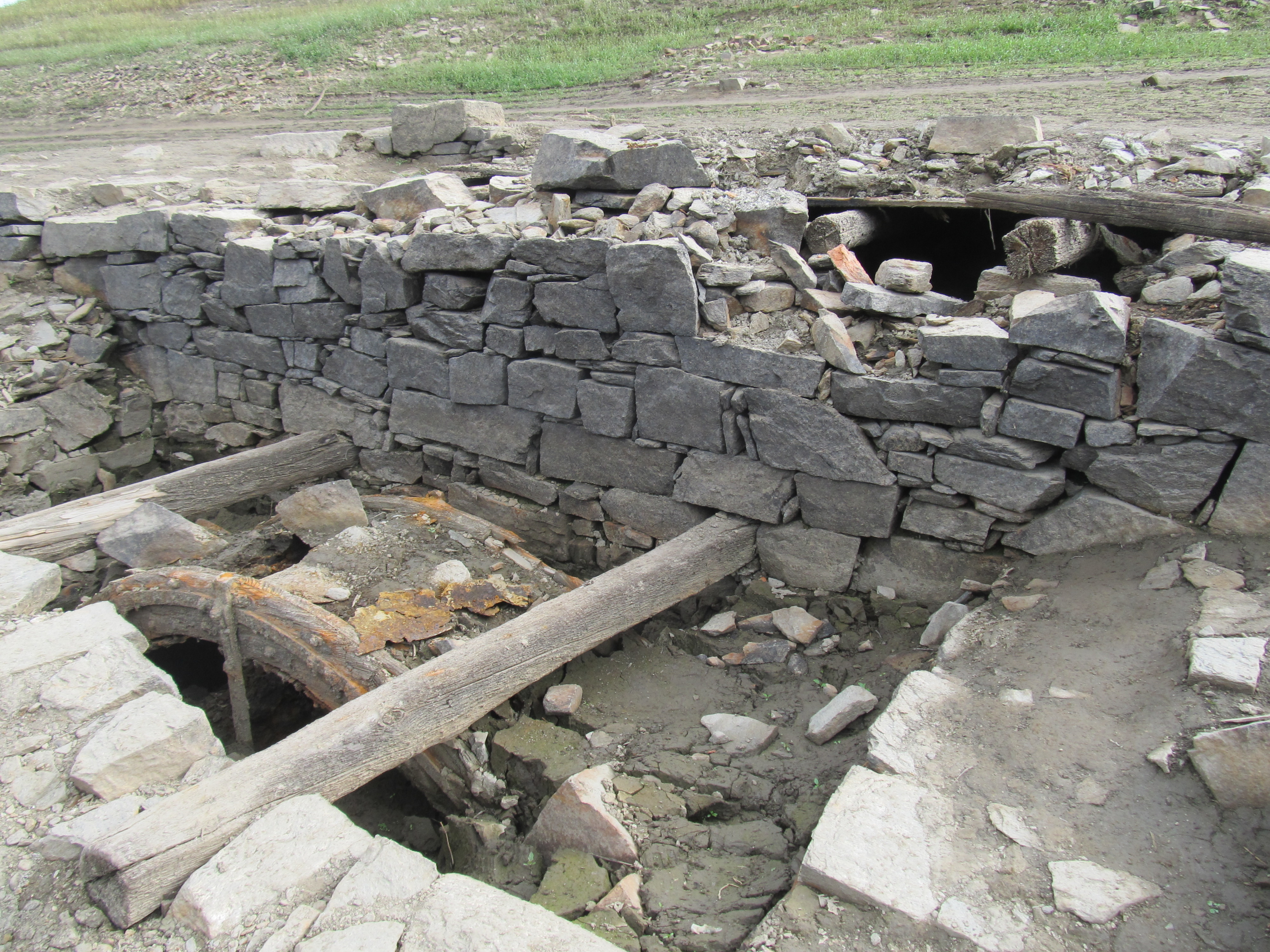 Kreherschmiede (zu Hennersdorf, Dippoldiswalde, Sachsen) bei Steinbrückmühle